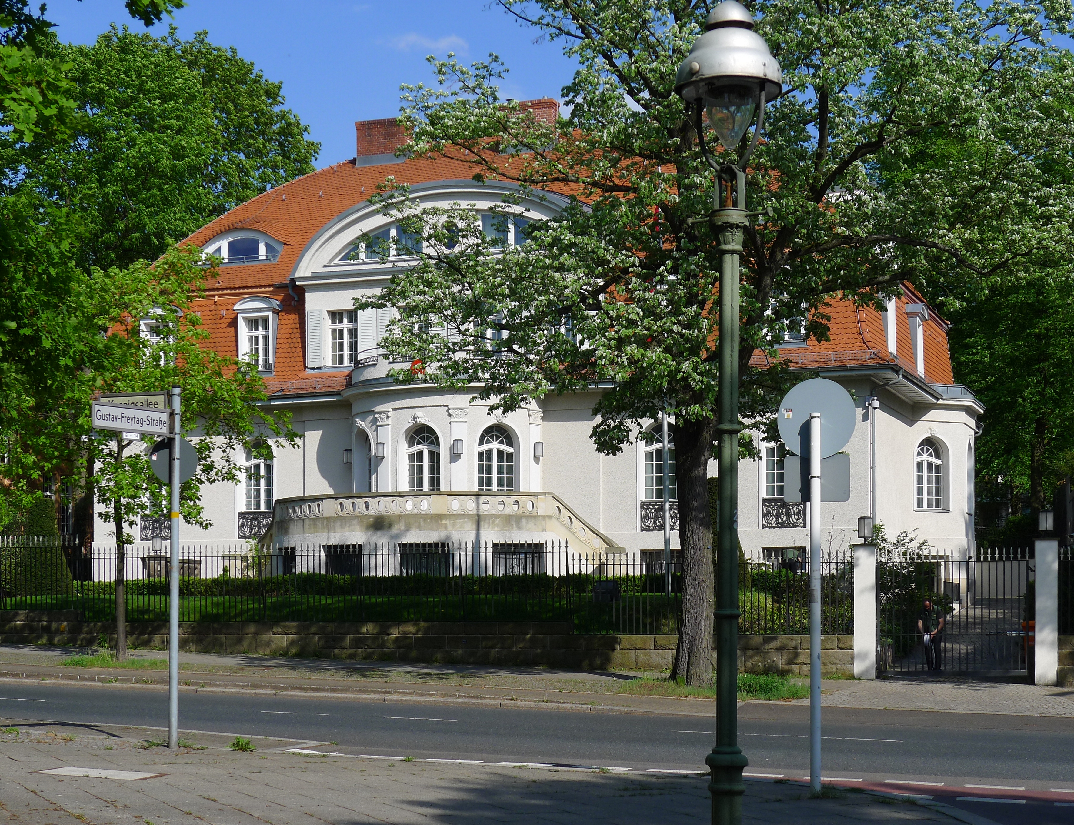 Villa